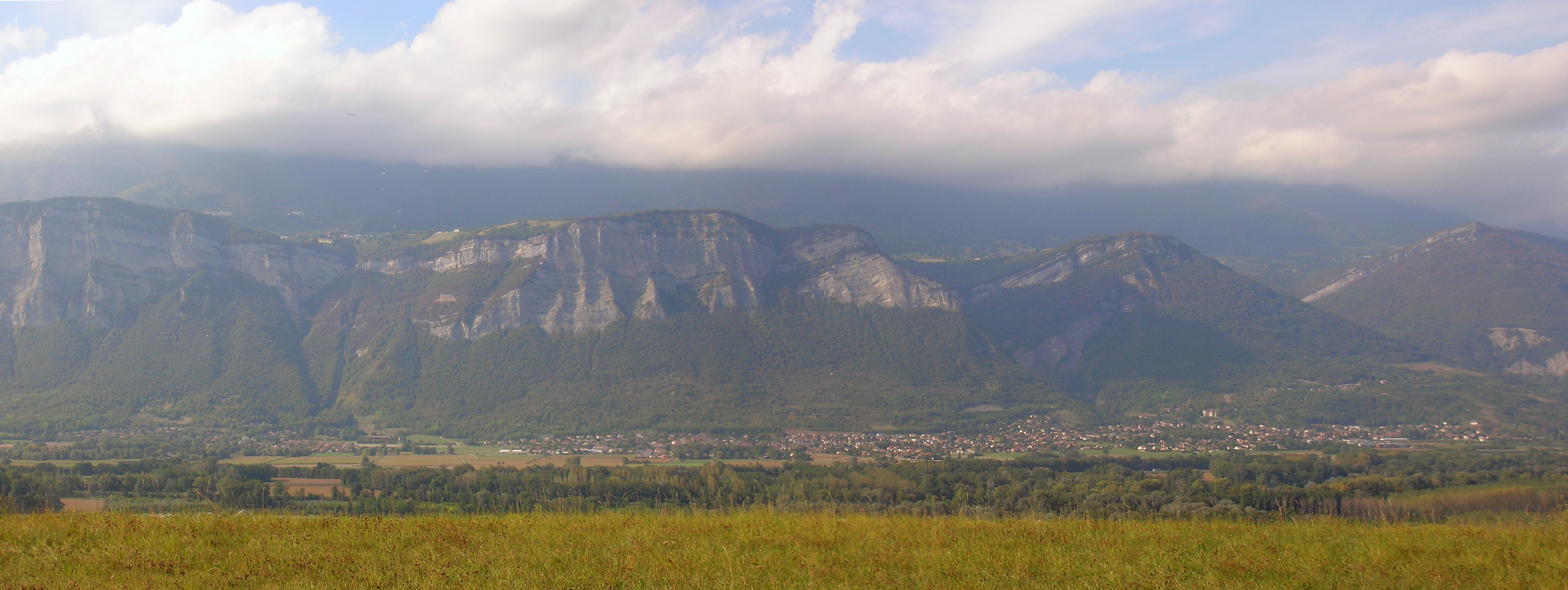 panorama depuis Le Champ-près-Froges, Isère, AuRA, France.